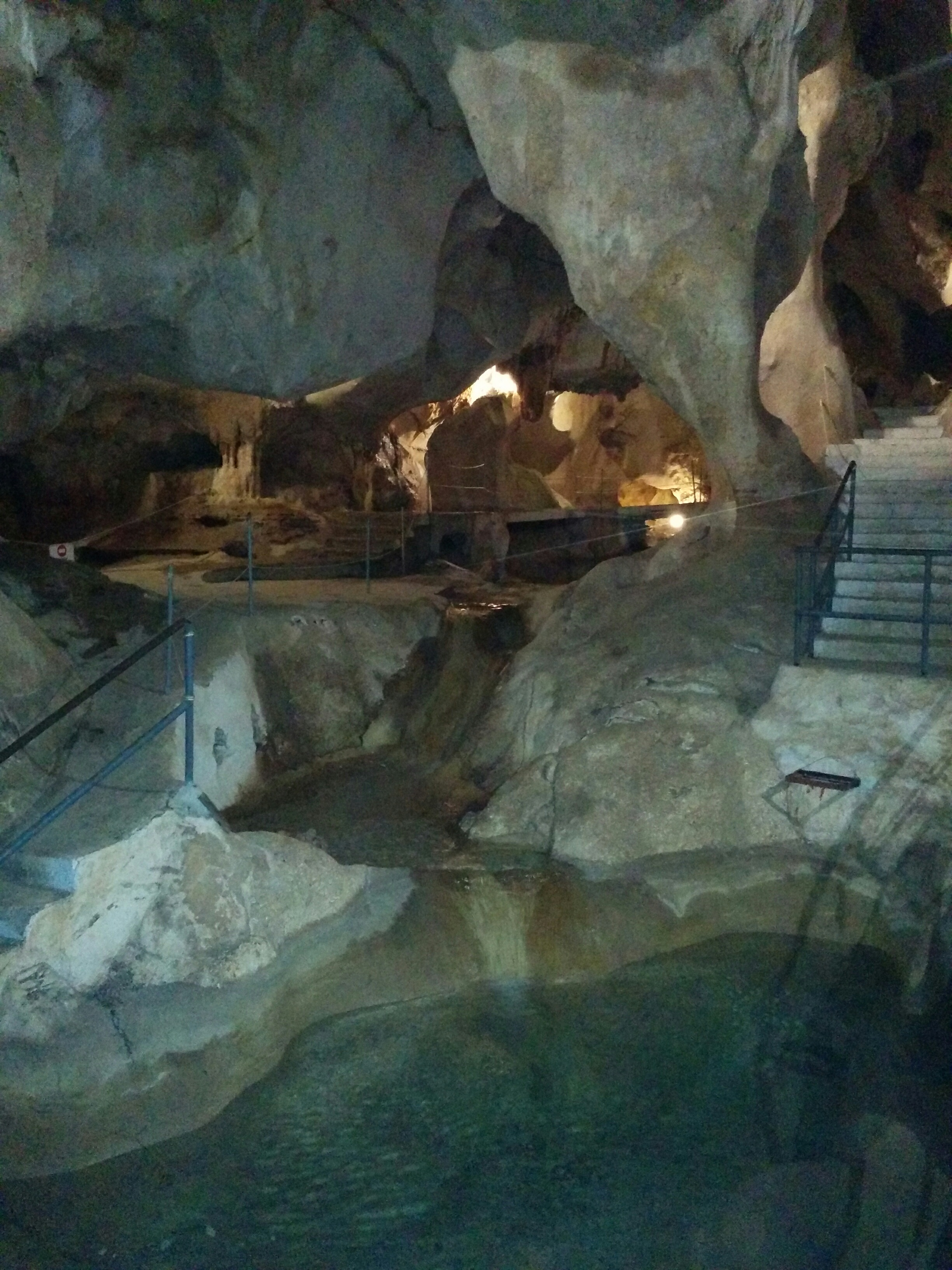 Cueva del Tesoro 2